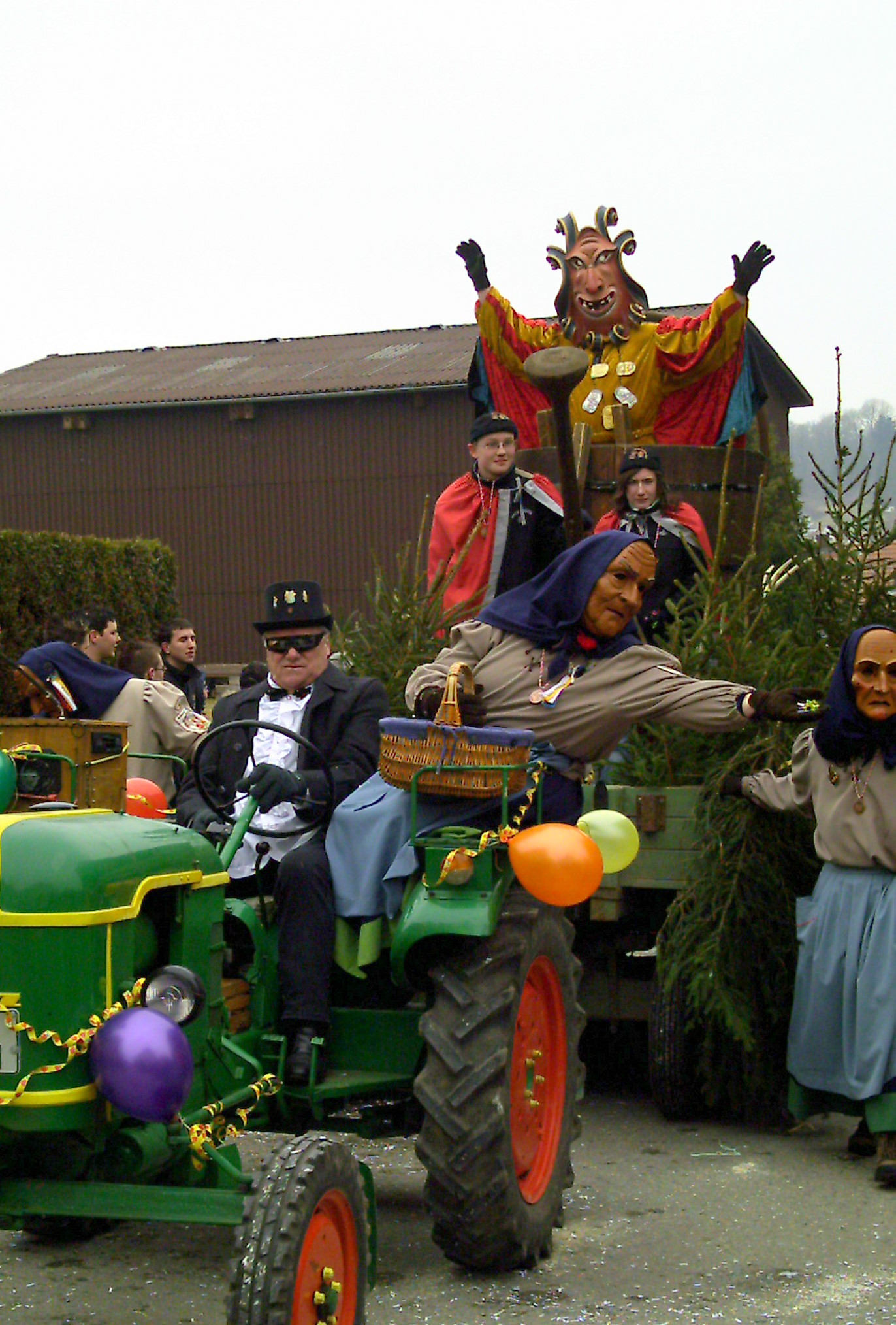 Narrenumzug Zell 2006 - Figur des Bobohle, hier der Oberbobohle.